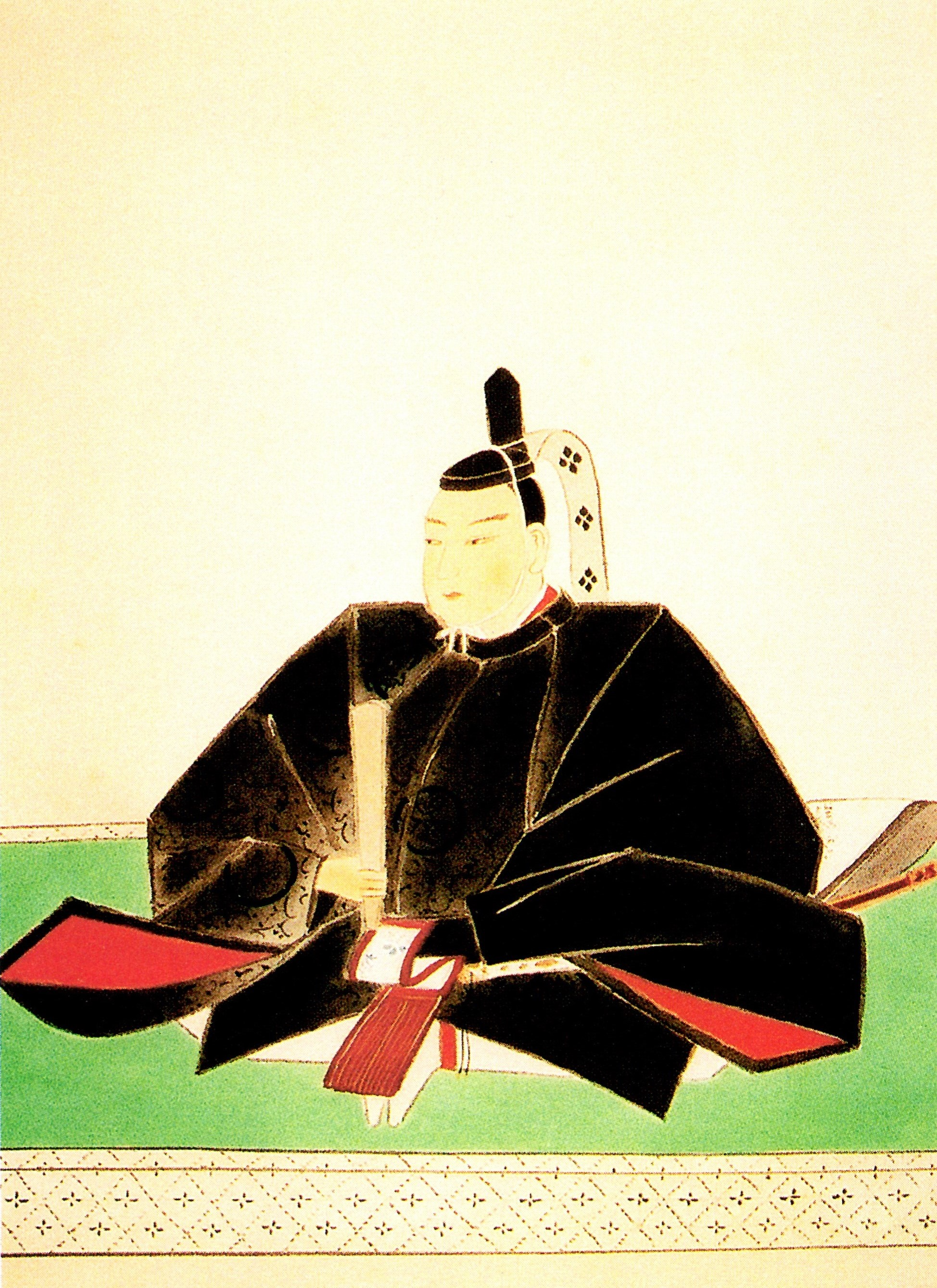 徳川忠長の肖像。